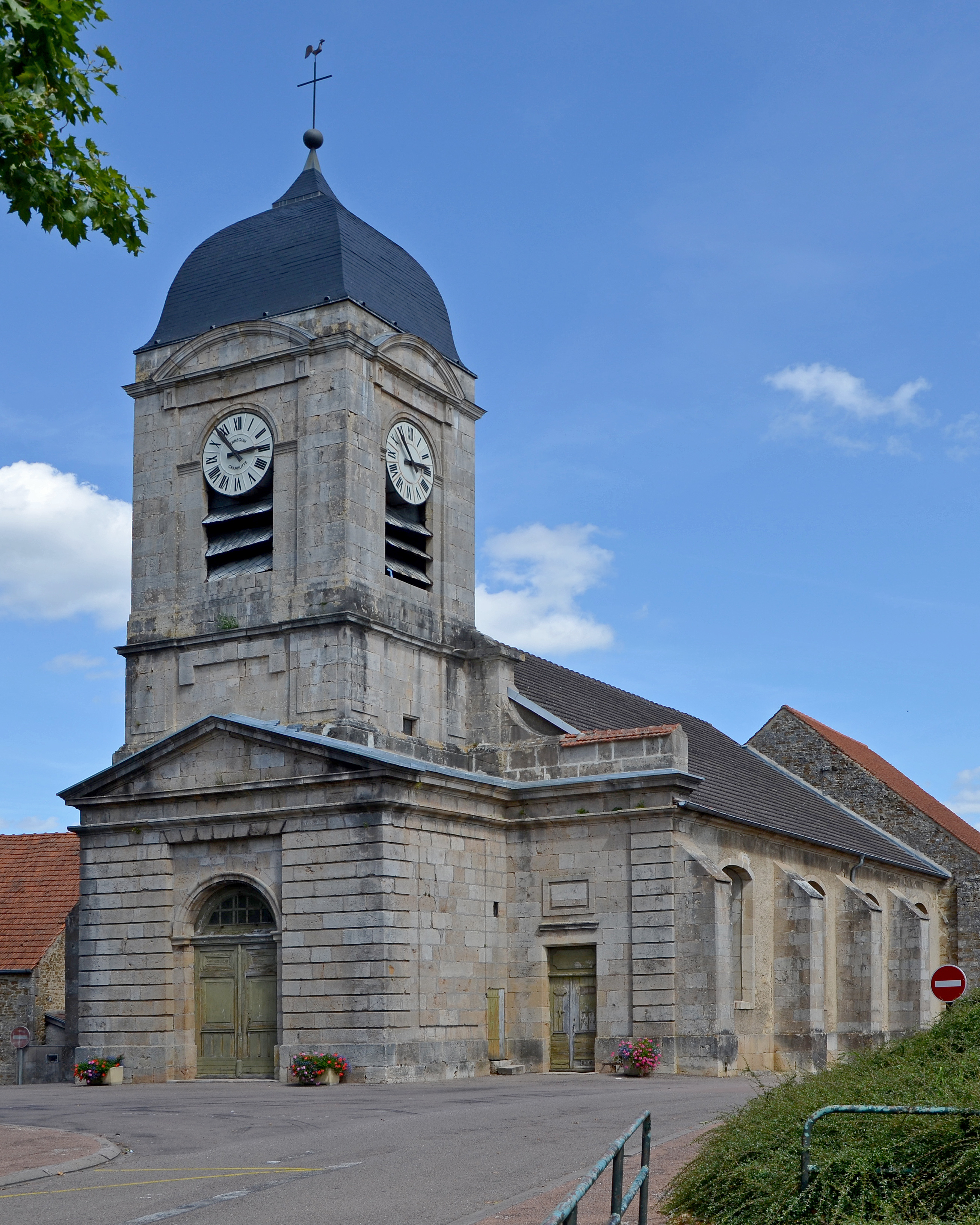 Église de Rolampont, Haute-Marne, Chapagne-Ardennes, France. Construction : 13e siècle ; 18e siècle. .